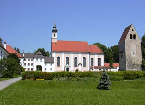 Wessobrunn